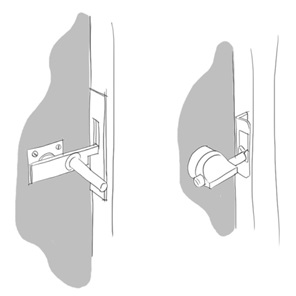 ภาพแสดงขอสับสำหรับล็อคประตูห้อง ที่ใช้แรงน้อย เบาแรง